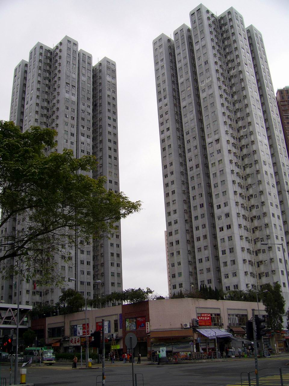 福安花園